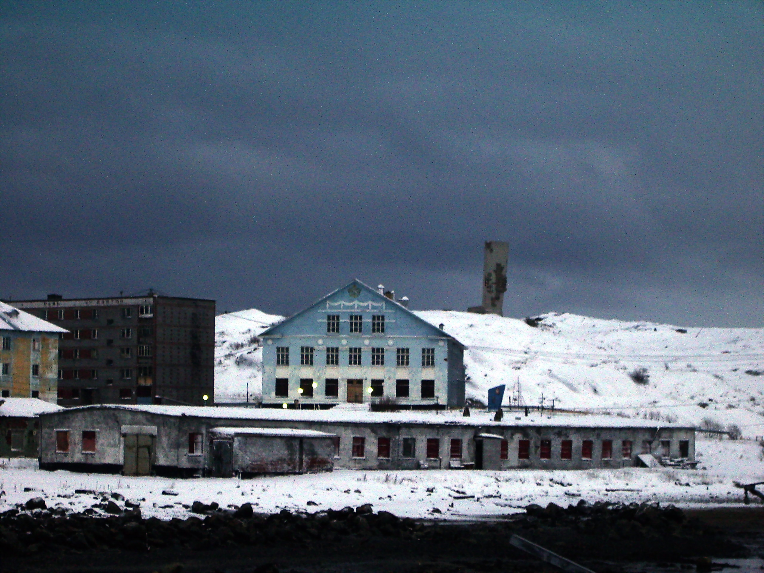 ДК в Кувшинской Салме